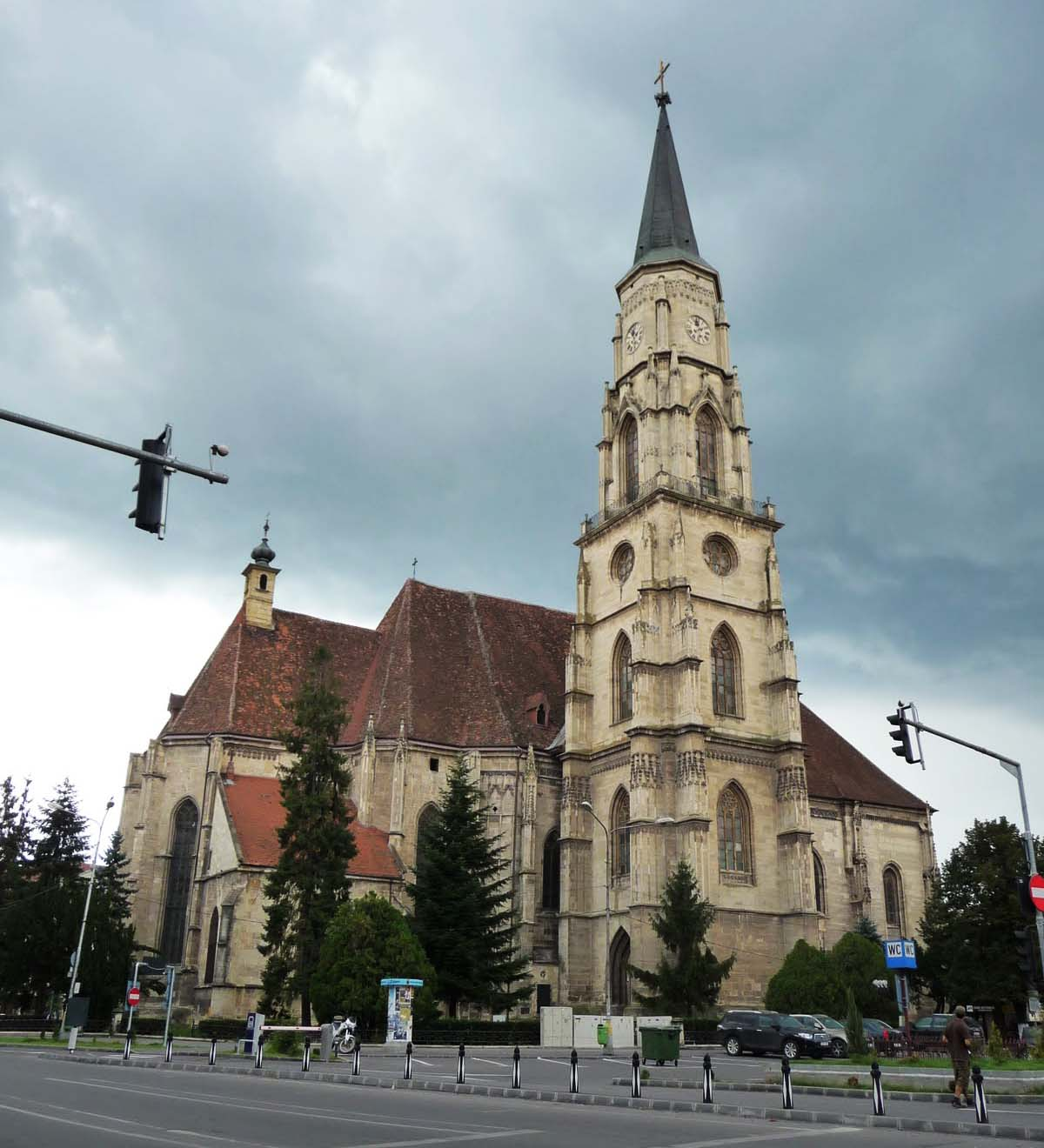 Biserica Sfantul Mihail din Cluj